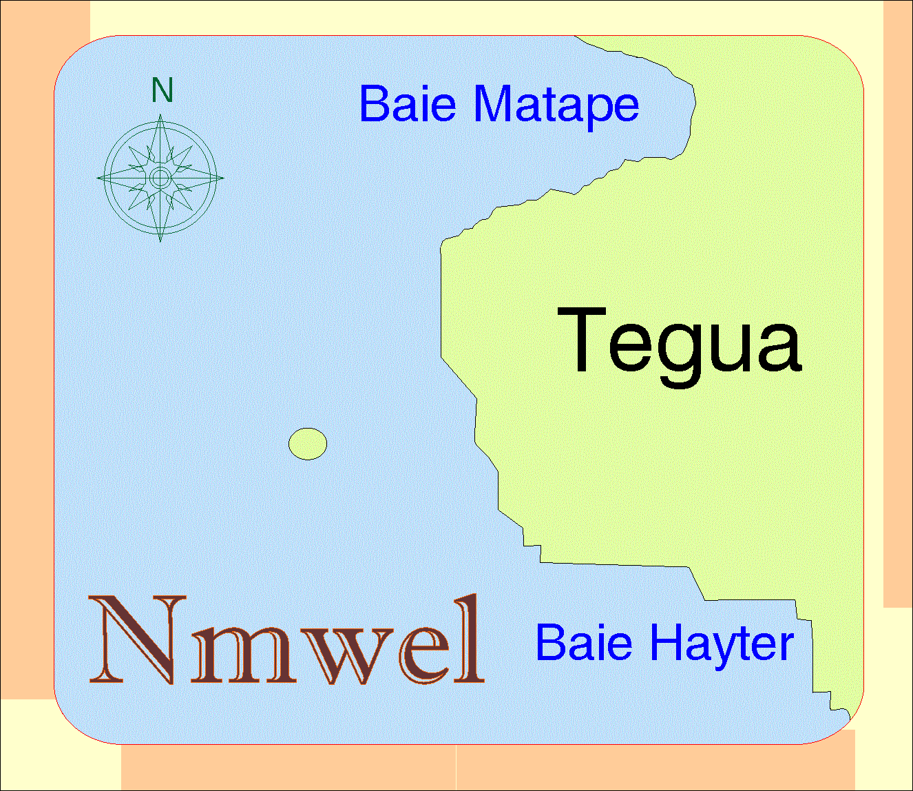 Карта на остров Нмуел.